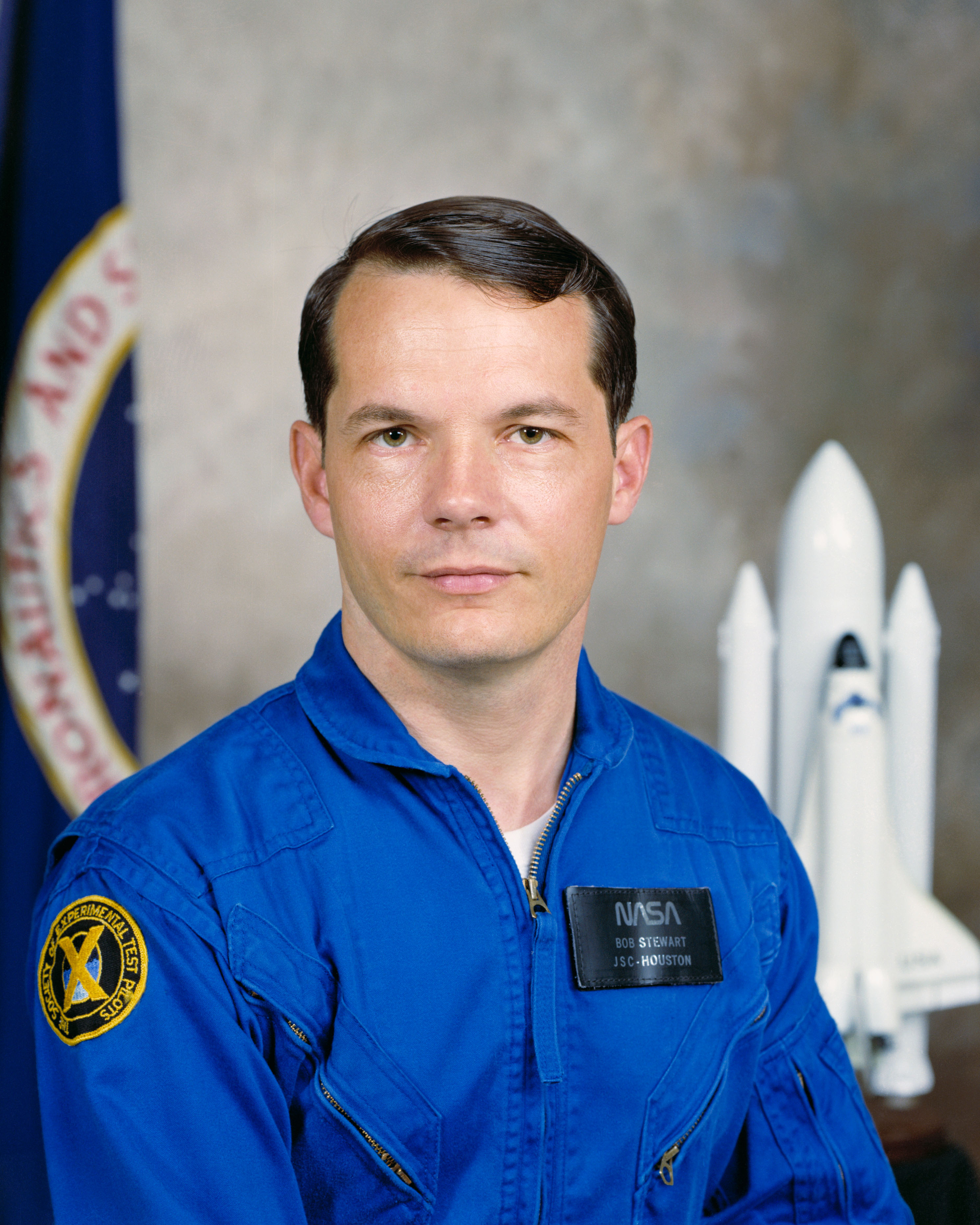 NASA Astronaut Robert L. Stewart